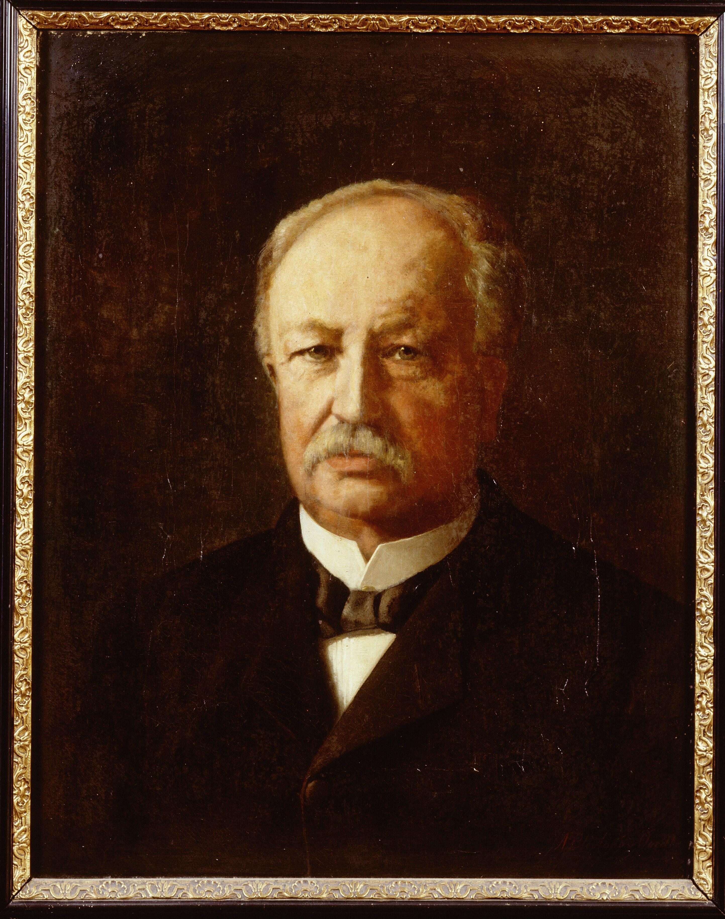 Portret van Joannes Pieter Roetert Tak van Poortvliet (1839-1904), door Adri Bleuland van Oordt